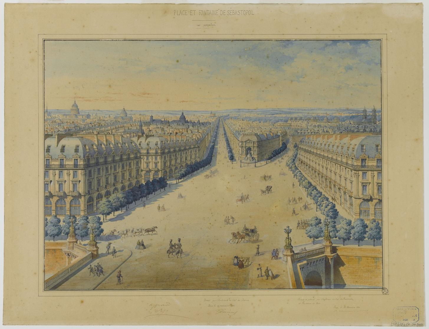 Titre: Place et fontaine de Sébastopol - Vue perspective.Inscriptions manuscrites dont « Dressé par le l'Architecte en Chef du Service / Paris le 23 (?) novembre 18..[? illisible] » et autres inscriptions ainsi que des signatures illisibles.Fait partie de "Fontaine de la paix. Place Saint-Michel - Paris" Fond iconographique de la Bibliothèque de l'Hôtel de Ville.Actuellement pont Saint-Michel, place Saint-Michel, fontaine Saint-Michel et boulevard Saint-Michel, Paris, France.